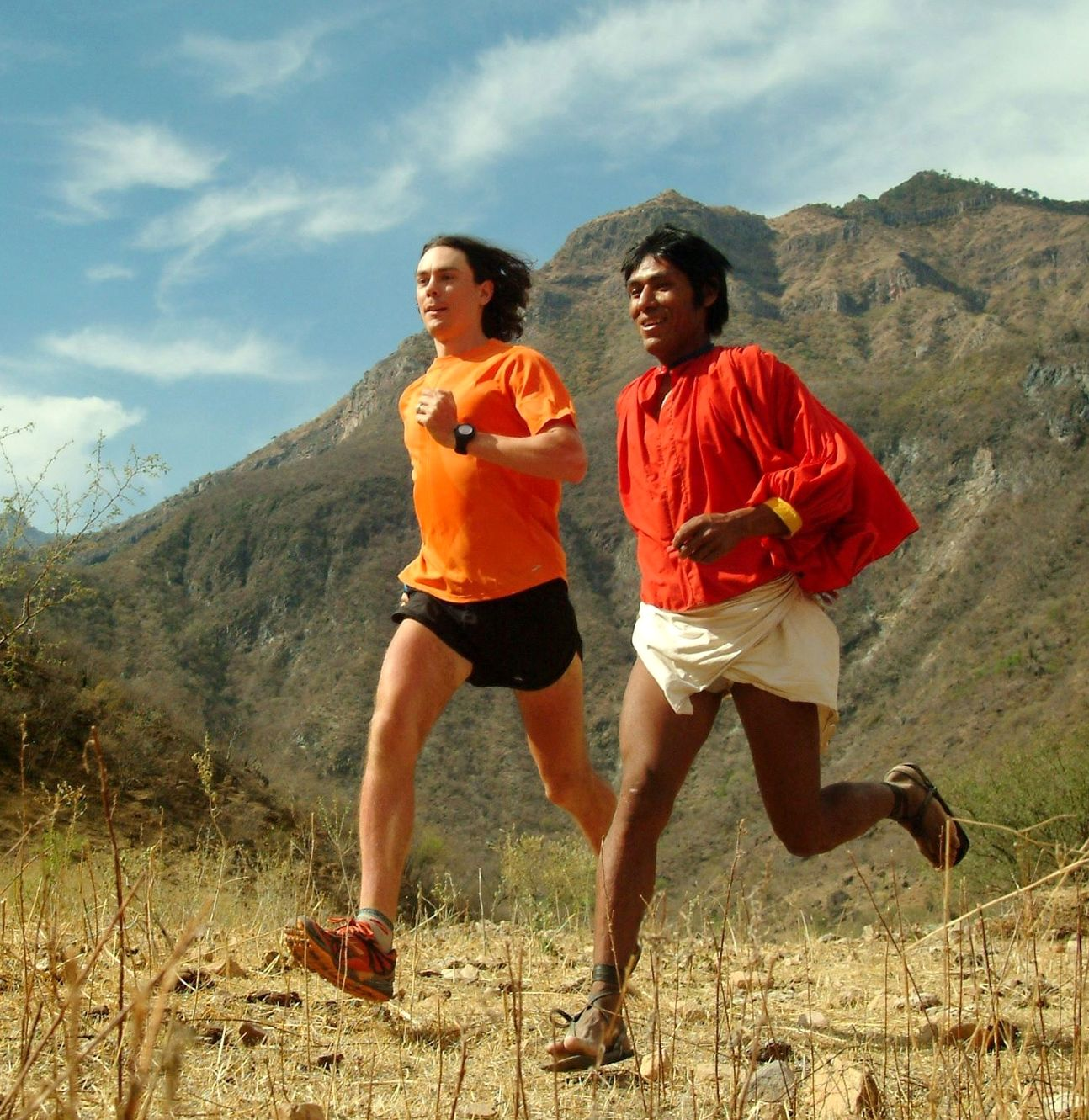 סקוט ג'וריק - אולטרה מרתוניסט טבעוני אמריקאי